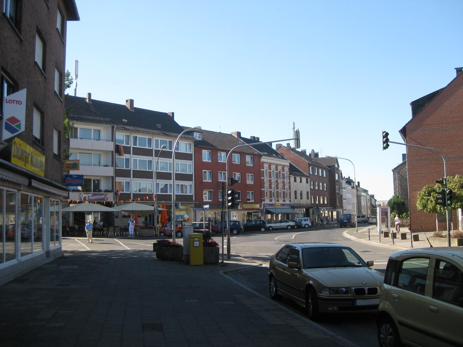 Ortsmitte beim Bürgerhaus im Stolberger Stadtteil Büsbach